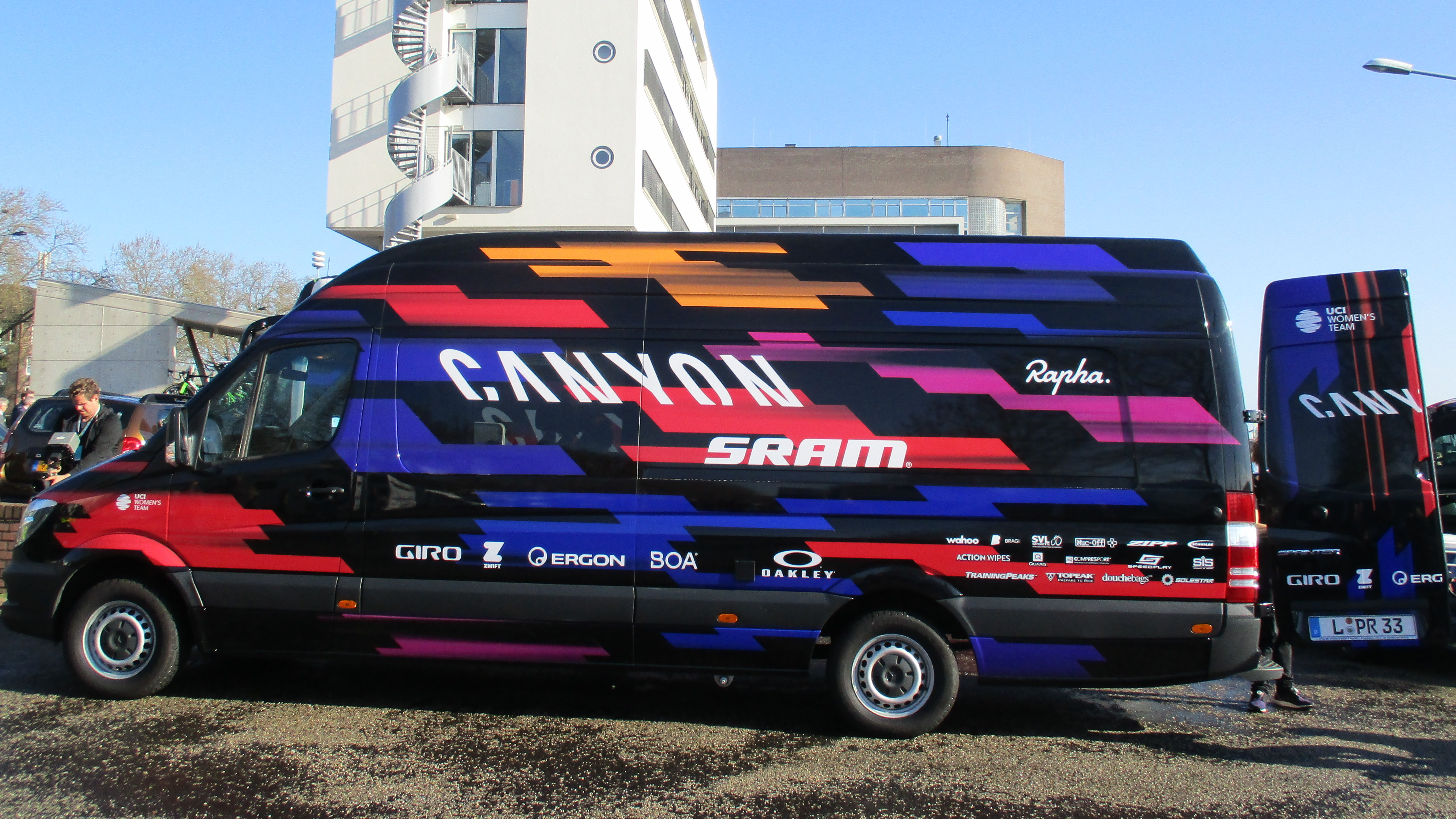 Start van de Amstel Gold Race Ladies Edition 2018 in Maastricht.